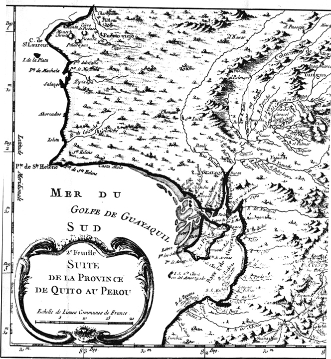 Parte de mapa de la Costa del Ecuador del siglo 18